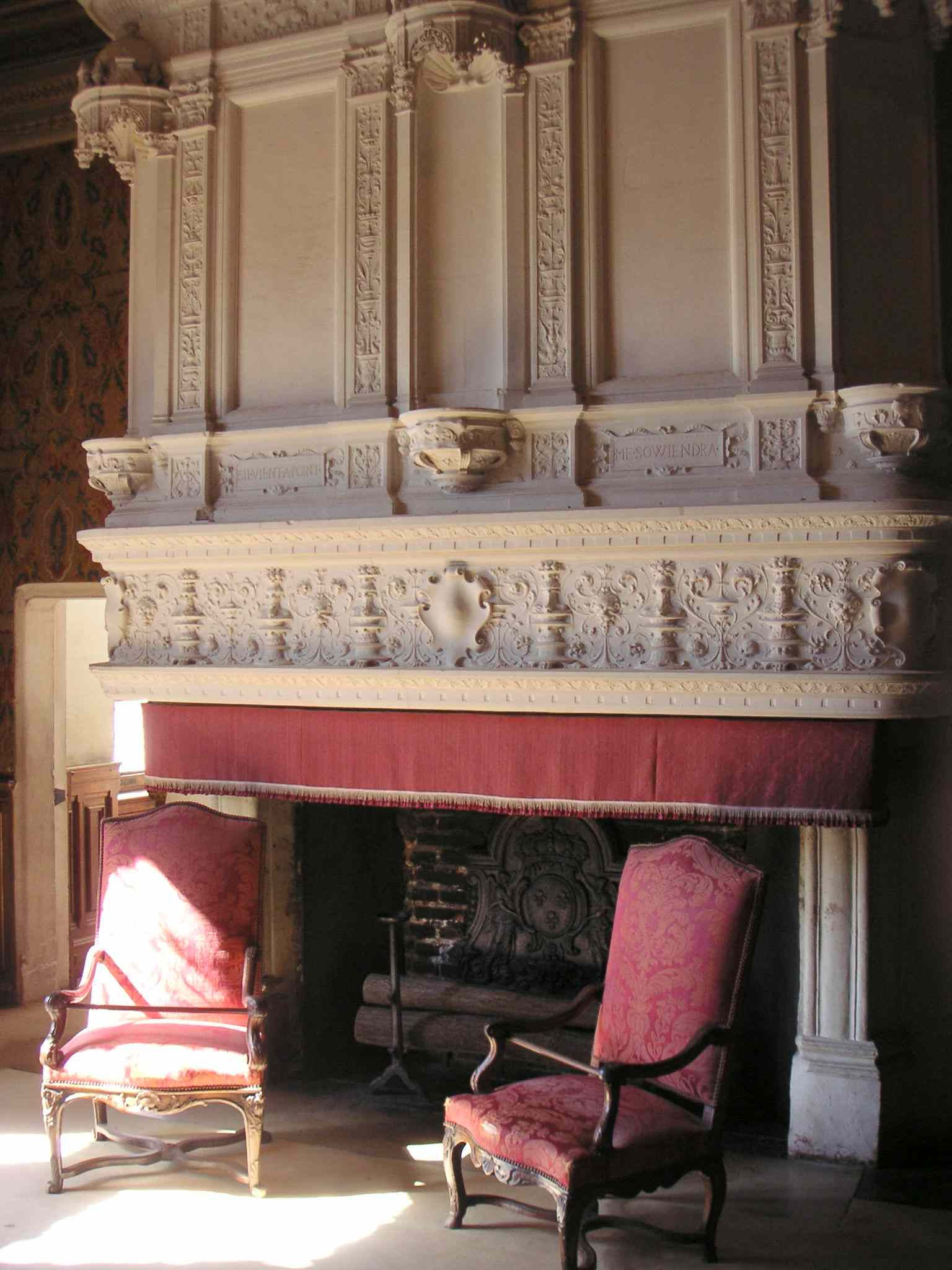 Chambre de François premier roi de France au château de chenonceau (France) prise par moi même en septembre 2005